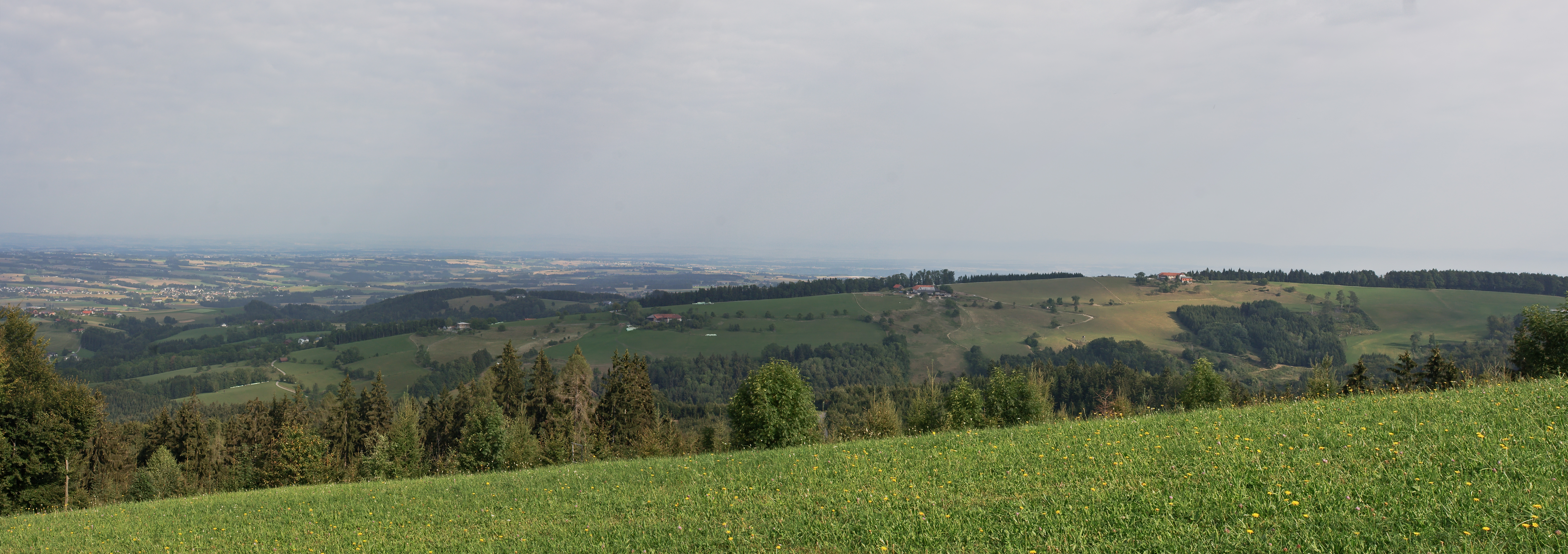 Weißen am Sattel in Nußbach (Oberösterreich). Blick von Oberschlierbach